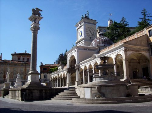 Udine, piazza Libertà con la fontana del Carrara